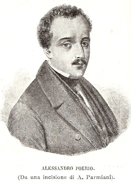 Ritratto di Alessandro Poerio